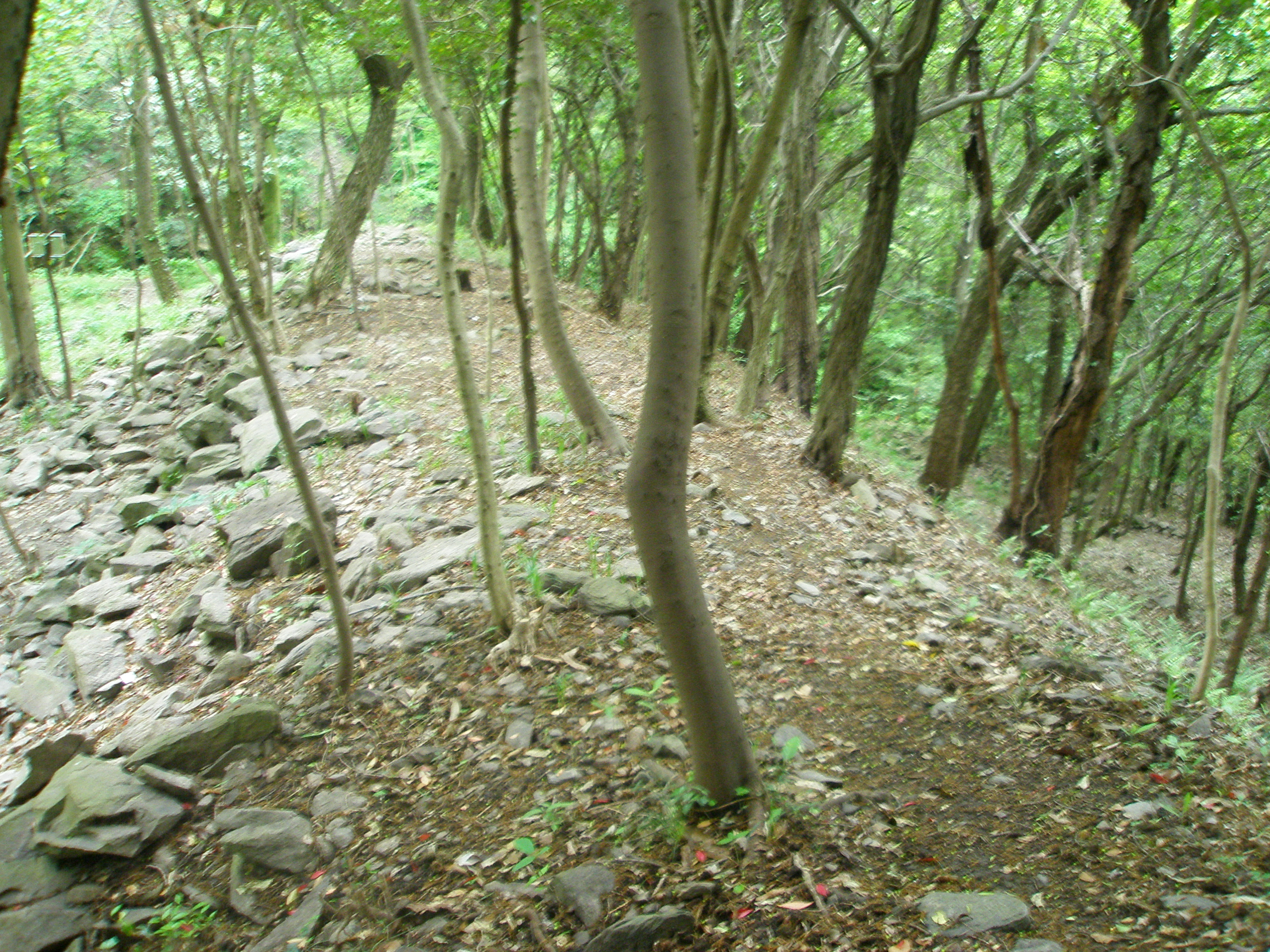 浦生の石塁の上部で山側から谷側を望む